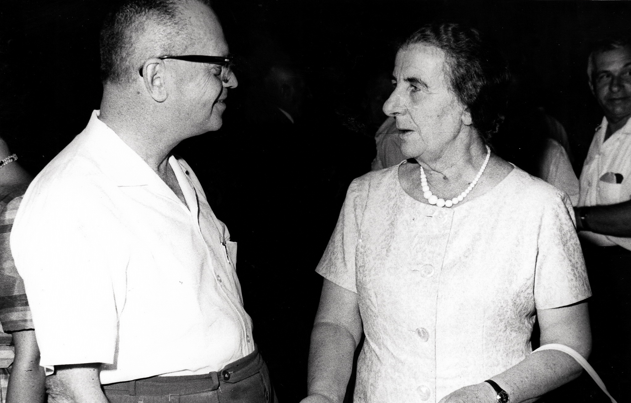 גולדה מאיר, שרת החוץ וזאב און. תל אביב - 3.9.1963